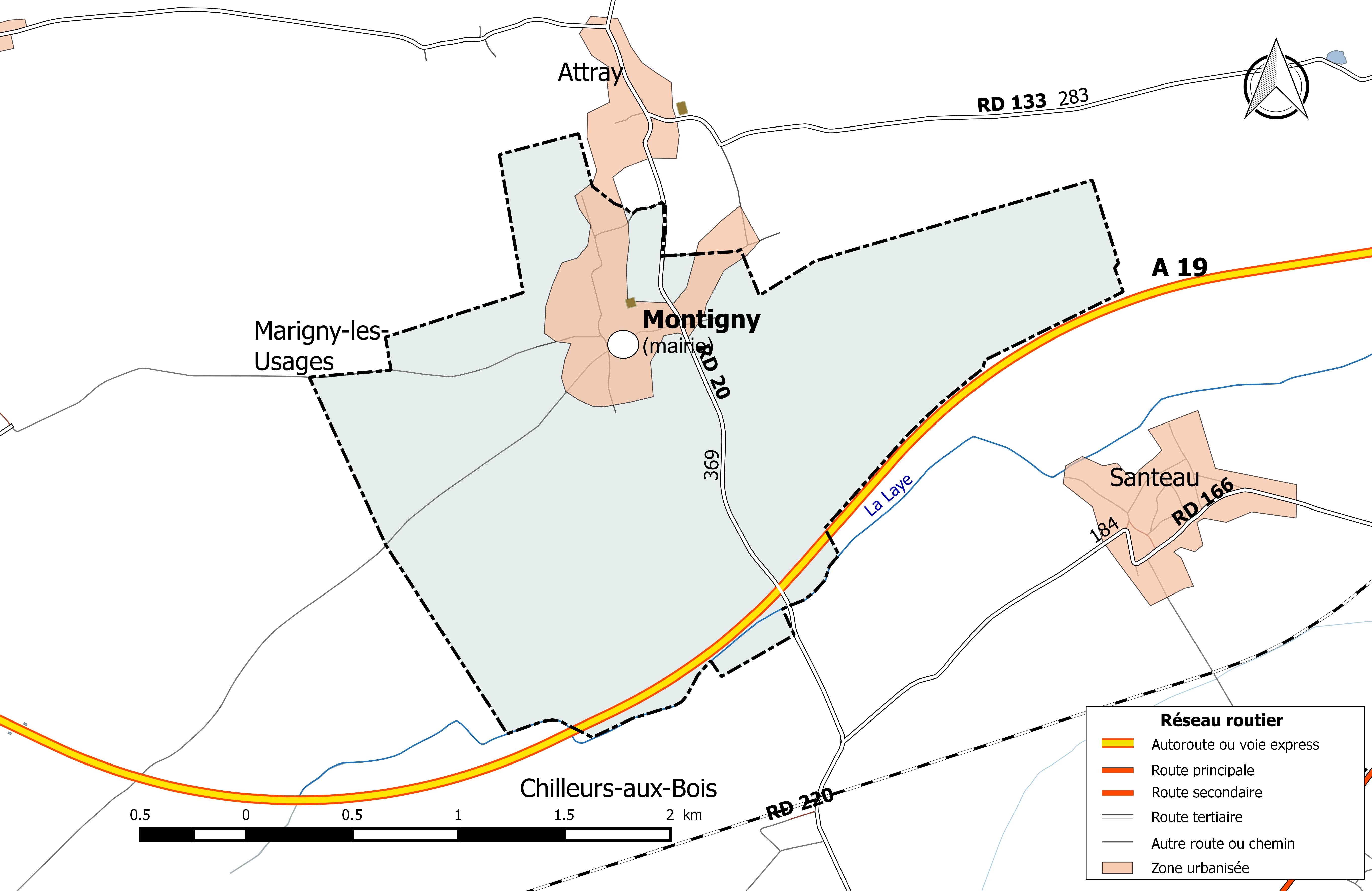 Carte du réseau routier de la commune de Montigny (Loiret).